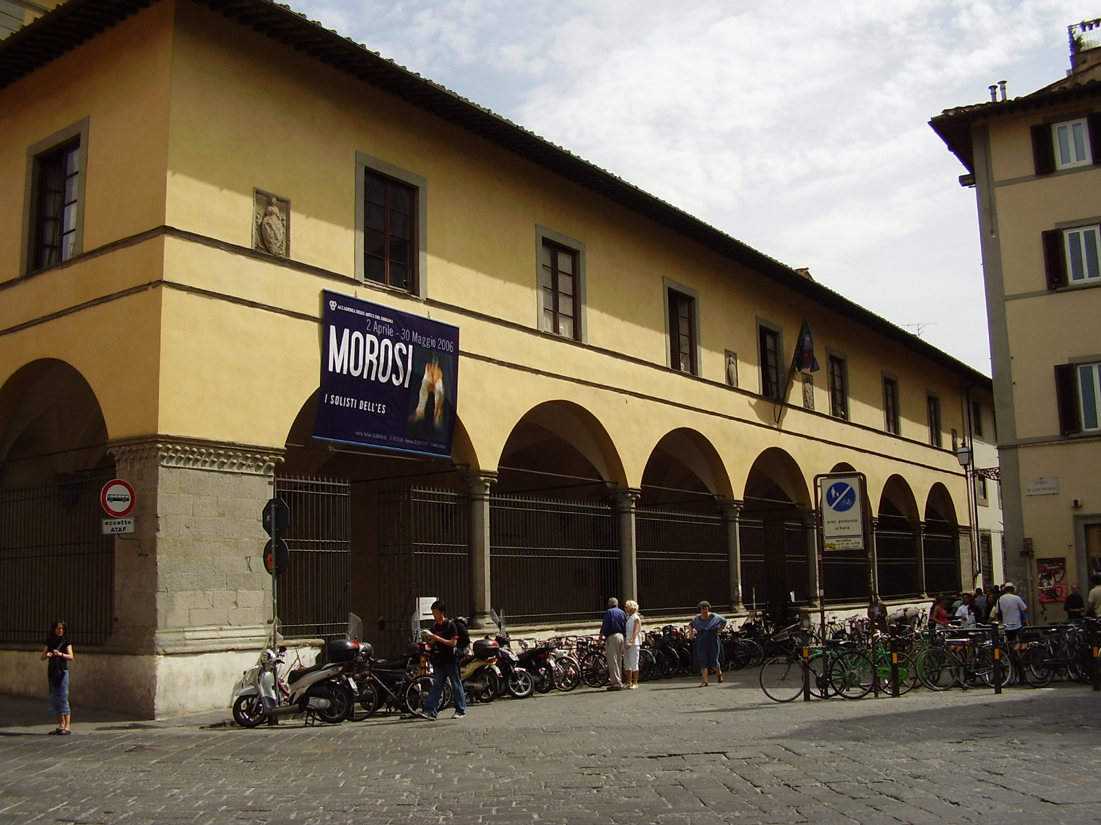 Accademia di belle arti, outside view from San Marco Square in Florence, Italy